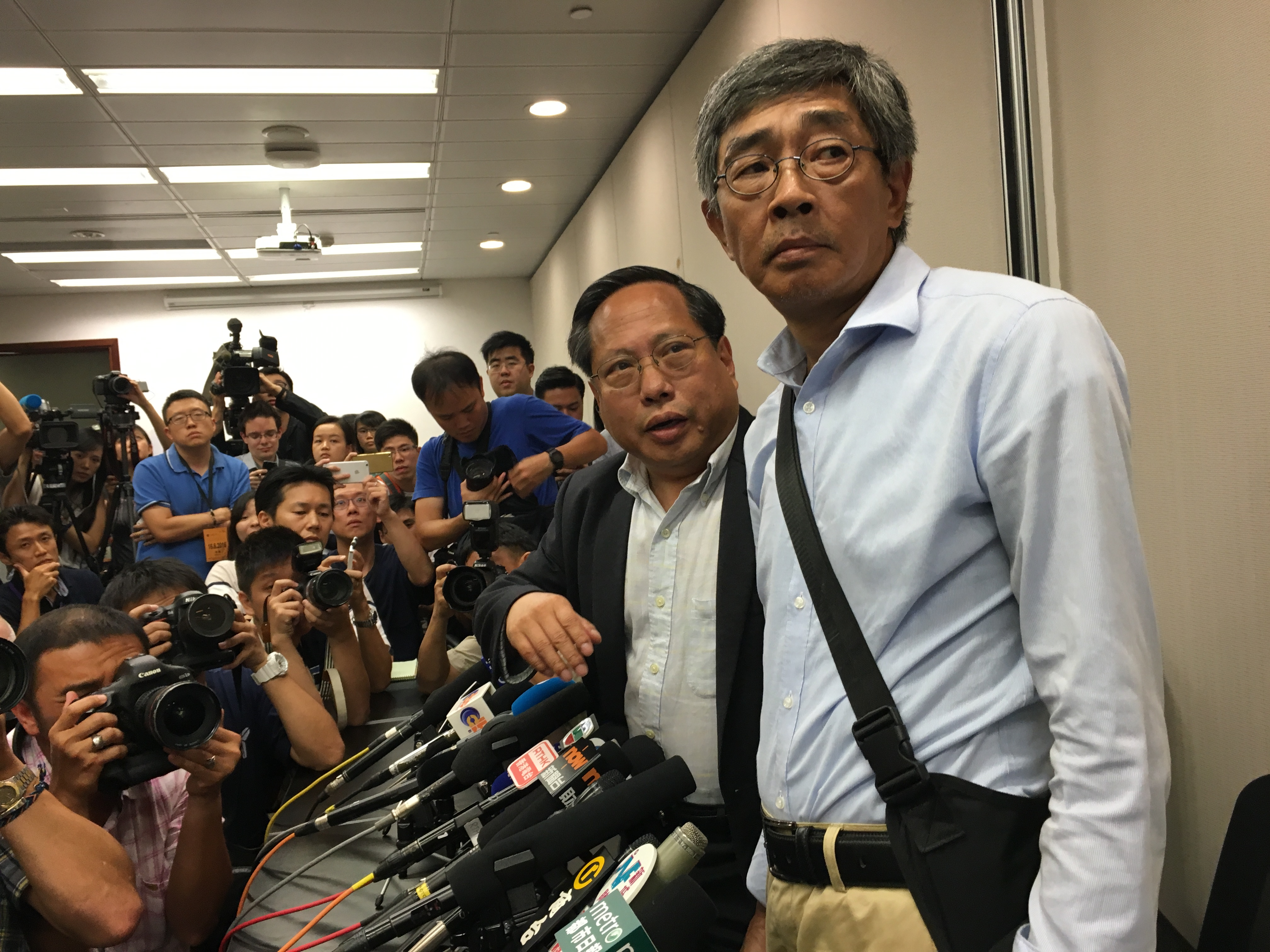 粵語: 香港銅鑼灣書店店長林榮基（右）與立法會議員何俊仁召開記者會。